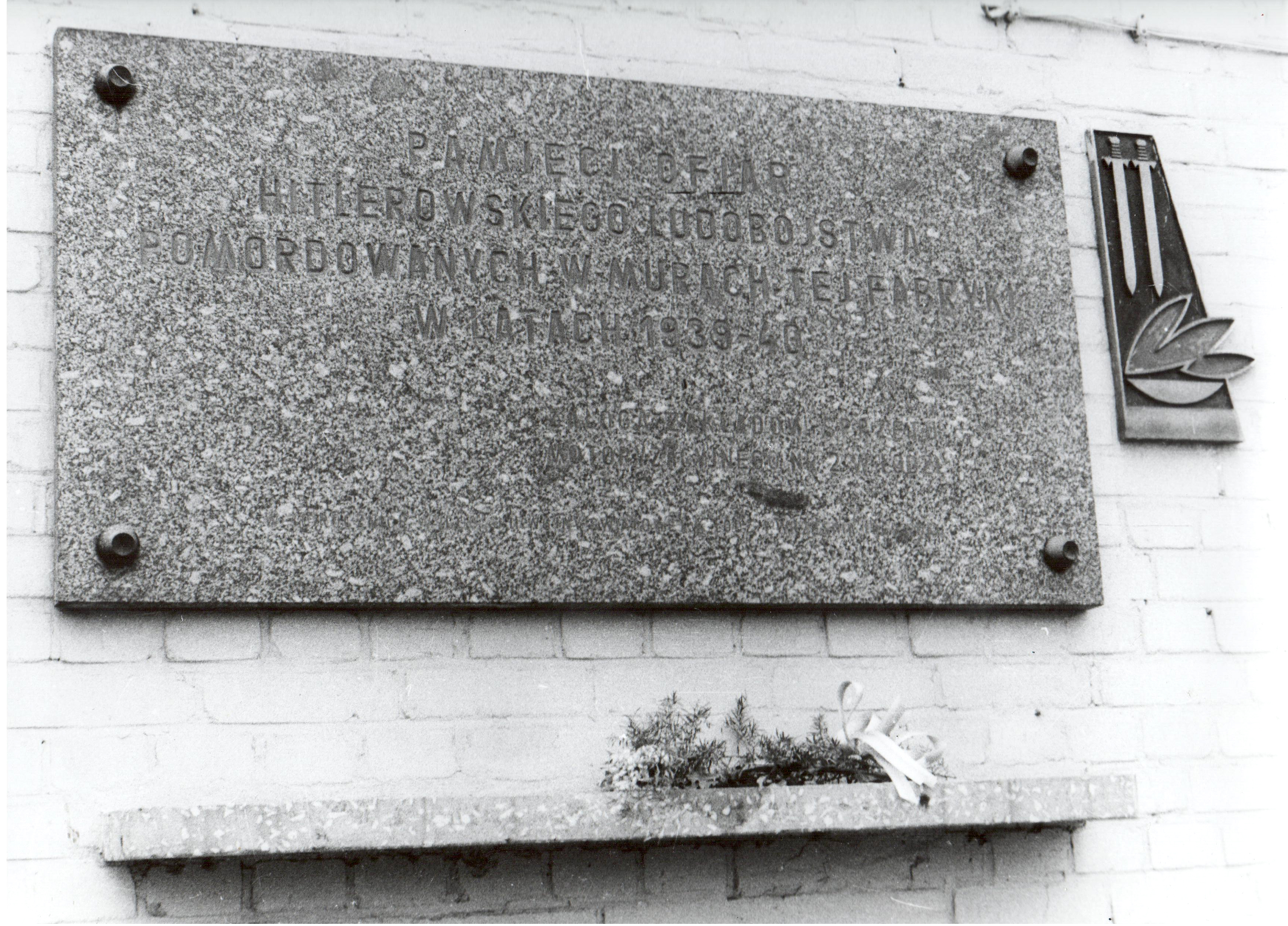 Łódź, tablica pamiątkowa na budynku ówczesnych Zakładów Sprzętu Motoryzacyjnego Nr 2 w Łodzi, obecnie Fabryka Pierścieni Tłokowych "Prima" S.A. (ul. Liściasta 17), upamiętniająca obóz przejściowy dla łódzkiej inteligencji w b. fabryce Michała Glazera od XI 1939 do I 1940. Treść tablicy: "'Pamięci ofiar hitlerowskiego ludobójstwa, pomordowanych w murach tej fabryki, w latach 1939–1940. Załoga Zakładów Sprzętu Motoryzacyjnego Nr 2 w Łodzi. W 30. rocznicę wybuchu II wojny światowej. Łódź 1 czerwca 1969 roku.".